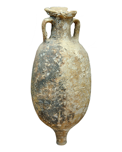 Ánfora Dressel 10 rescatada en el mar, en las inmediaciones del yacimiento.